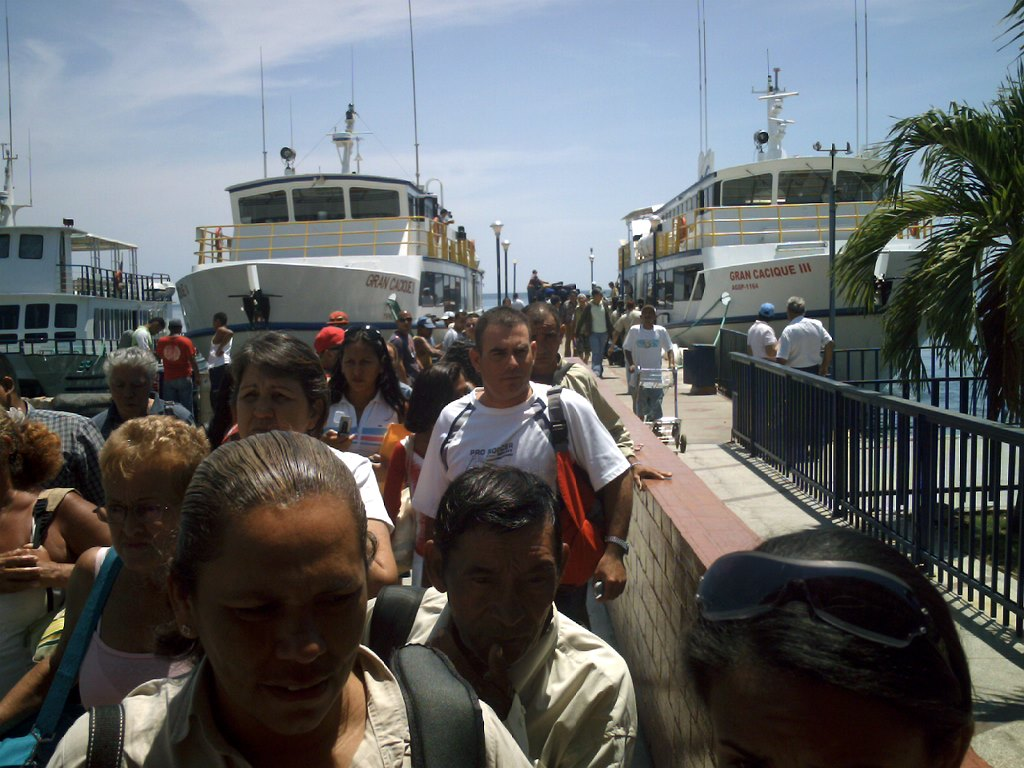 Lanchas que transportan pasajeros de Margarita hacia Cumana